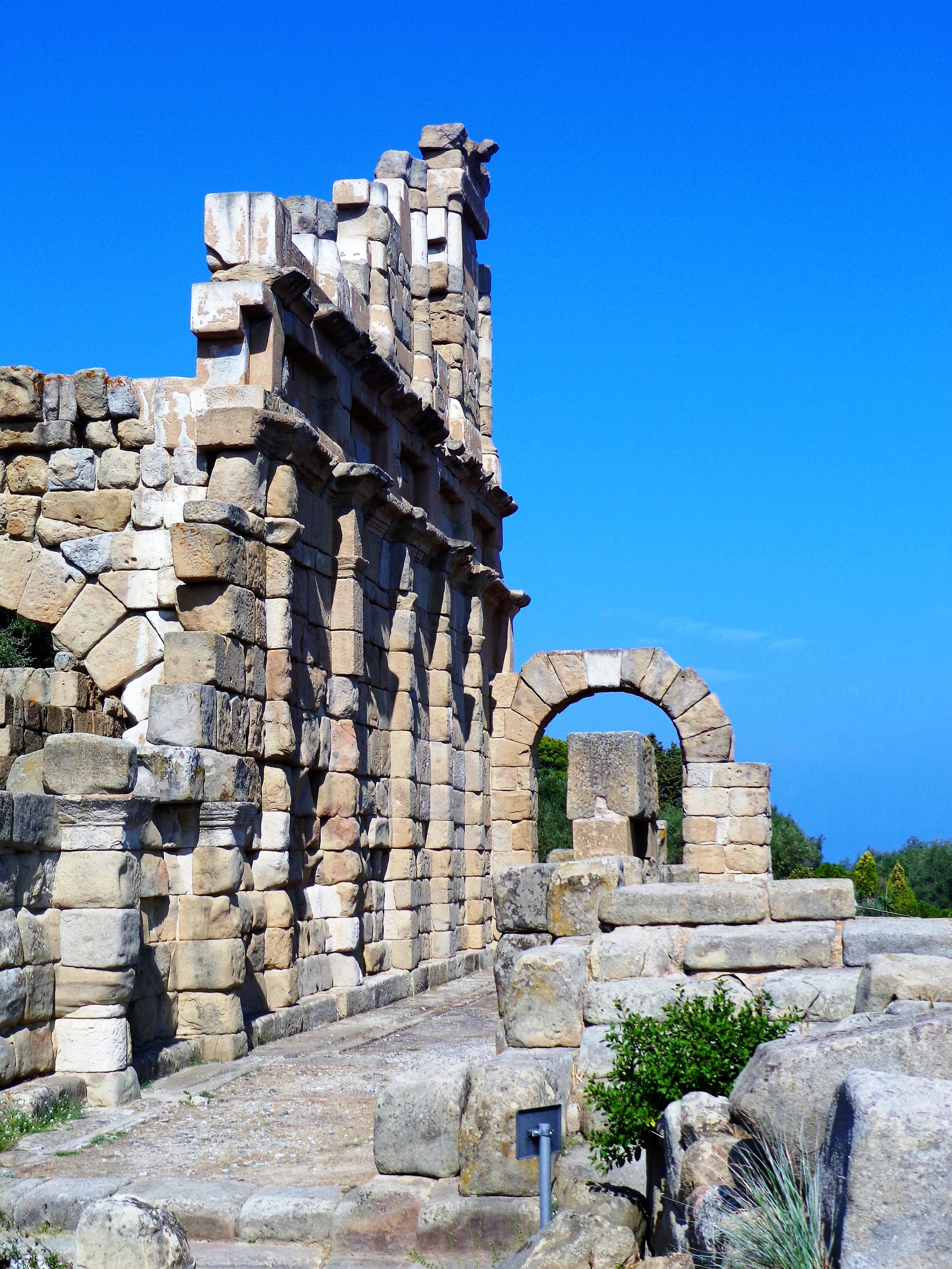 Gymnasium. 08 settembre 2012 (Escursione Tindari, Santuario e area archeologica). Scatto fotografico altresì presente negli album caricati sui profili personali di Facebook, Panoramio, Google, etc.